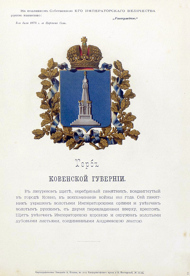 Official Russian Empire coat of arms Kovno Governorate. Герб Российской Империи Ковенской губернии с официальным описанием в Гербовнике Бенке. Утверждён Императором Всероссийским Александром Вторым.